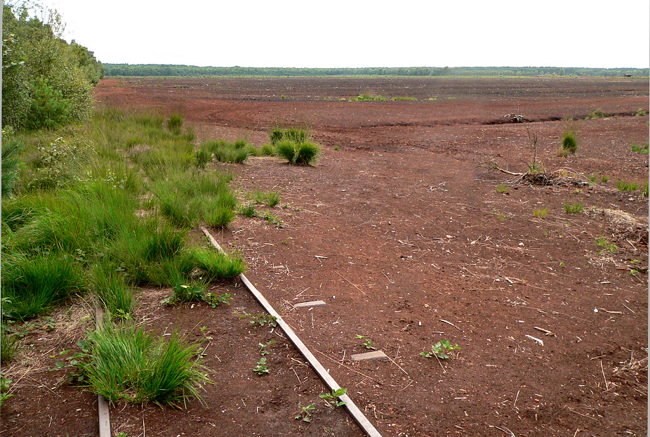 Überwucherte Feldbahngleise vom Torfabbau im Toten Moor